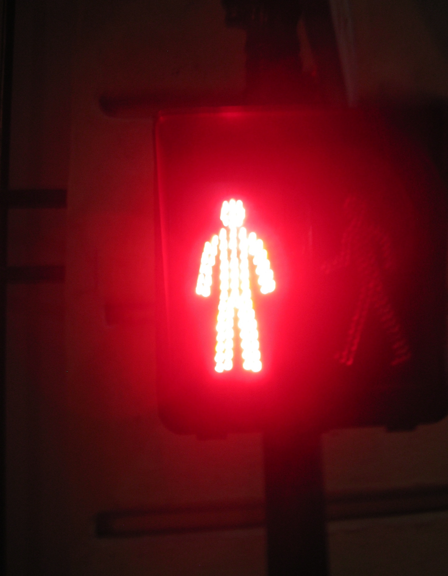 'n Rooi voetgangerslig.